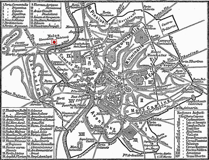 Map of Ancient Rome, location of Hadrian Mausoleum, in red near Tiber river. Personnal work. Carte de la Rome antique, en rouge localisation du Mausolée d'Hadrien, près du Tibre.